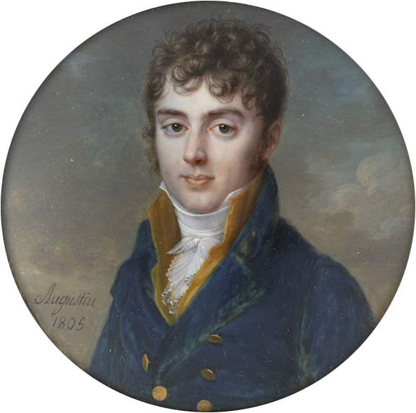 Anne-Ferdinand-Louis de Berthier, comte de Sauvigny